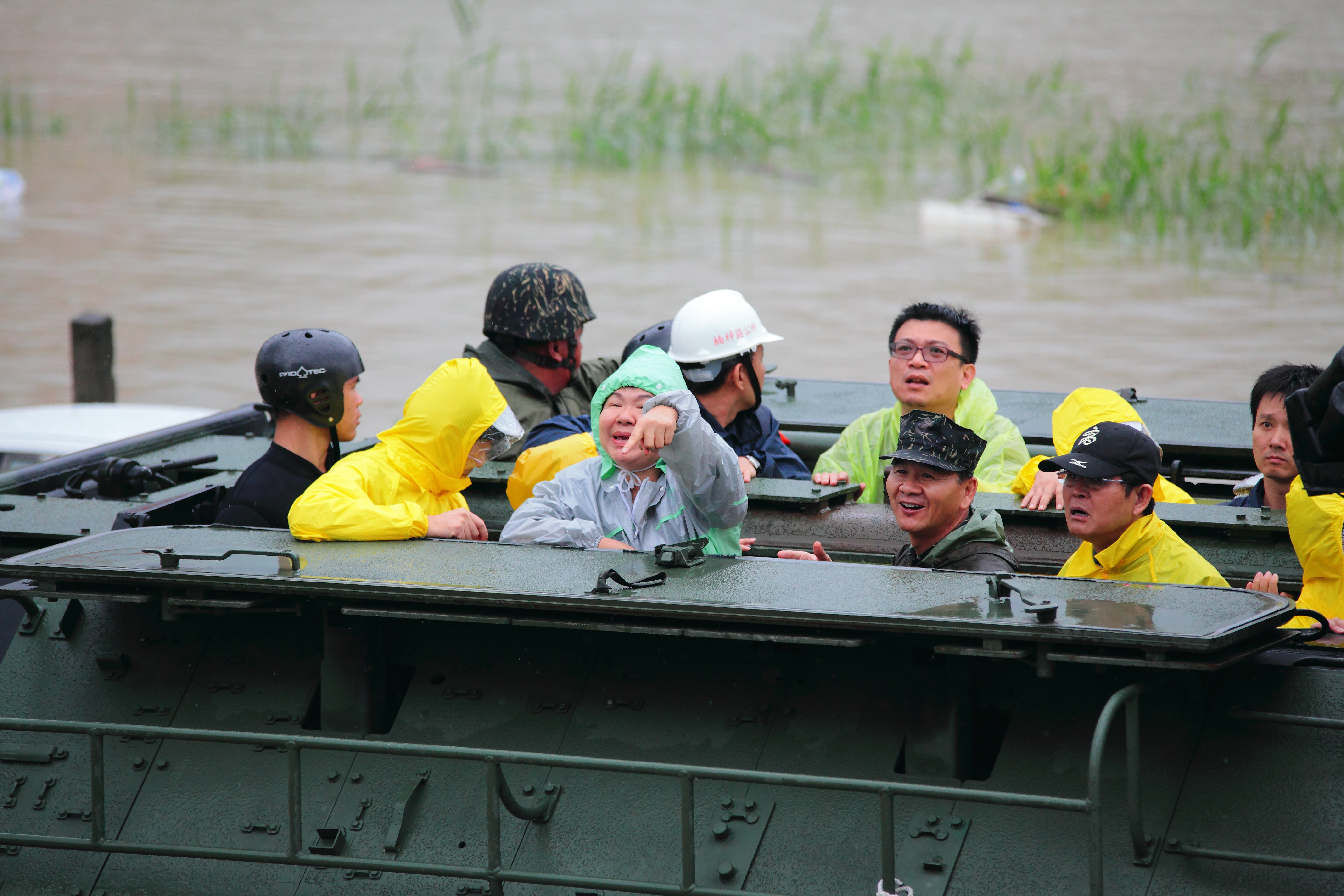 高雄市長, 陳菊 凡那比風災